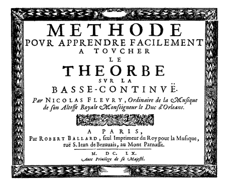 Title page of Fleury's Méthode pour le théorbe, 1660.